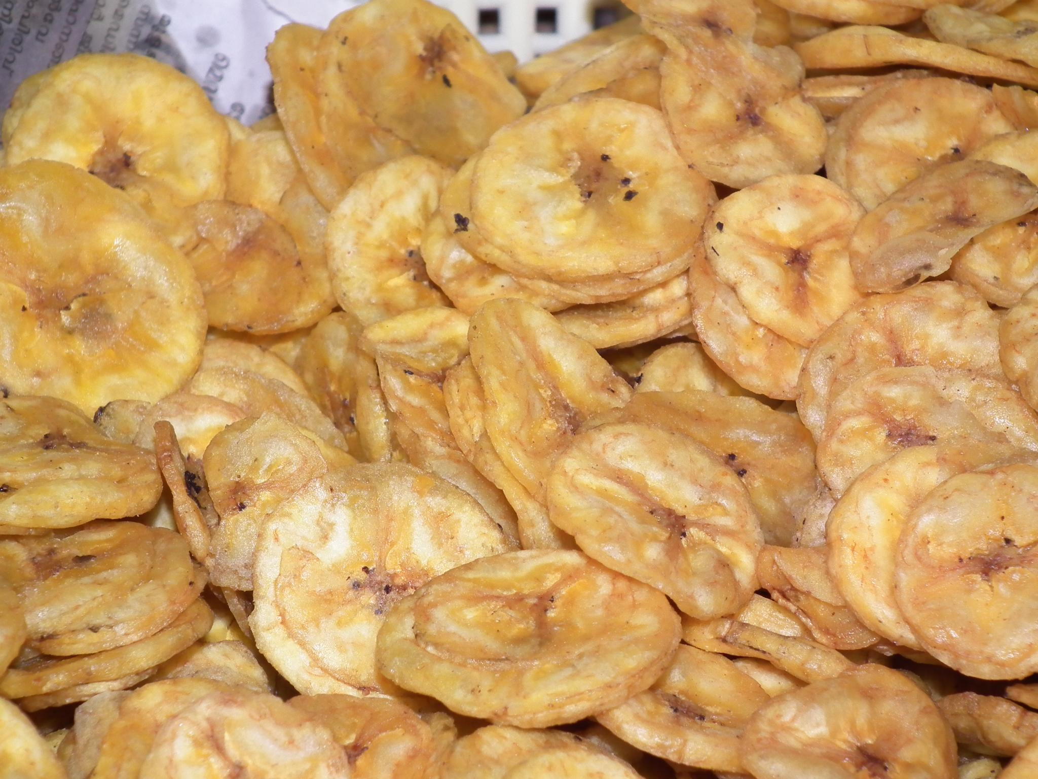 Kerala banana chips Upperi varuthath